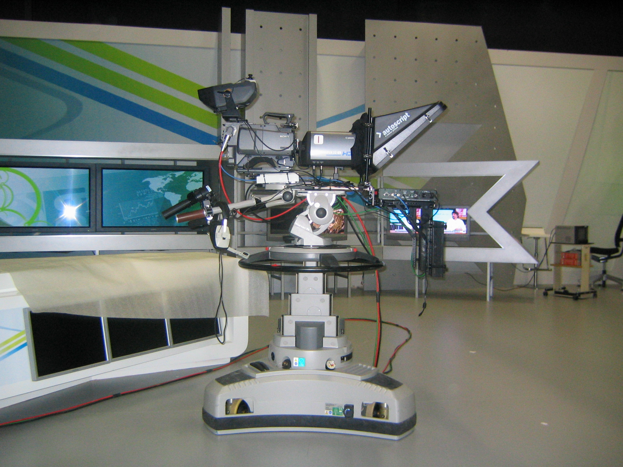 Cámaras de televisión, marca Sony.